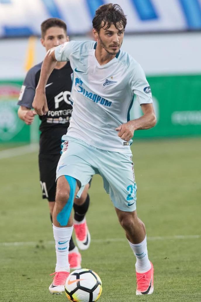 30.07.17. Россия, Санкт-Петербург, Петровский, Большая арена. РОСГОССТРАХ – Чемпионат России 2017/2018, 3-й тур, «Тосно» — «Зенит».